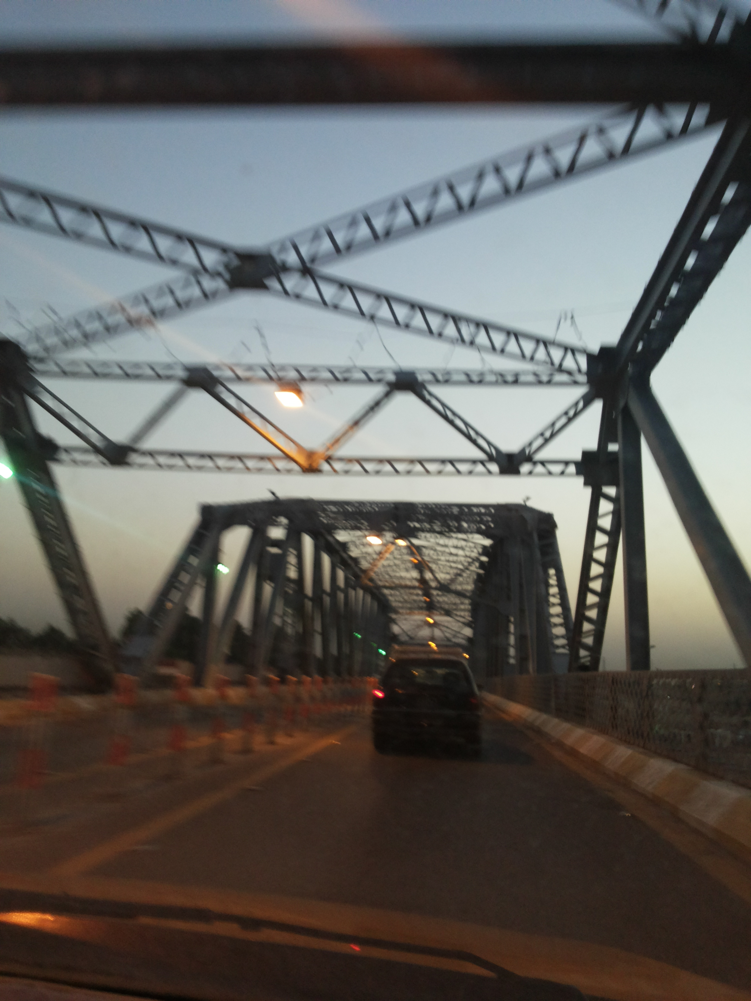 al-sarrafiya bridge in Baghdad